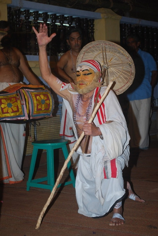 കുചേലവൃത്തം കഥയില്‍ കുചേലനായി മടവൂര്‍ വാസുദേവന്‍ നായര്‍